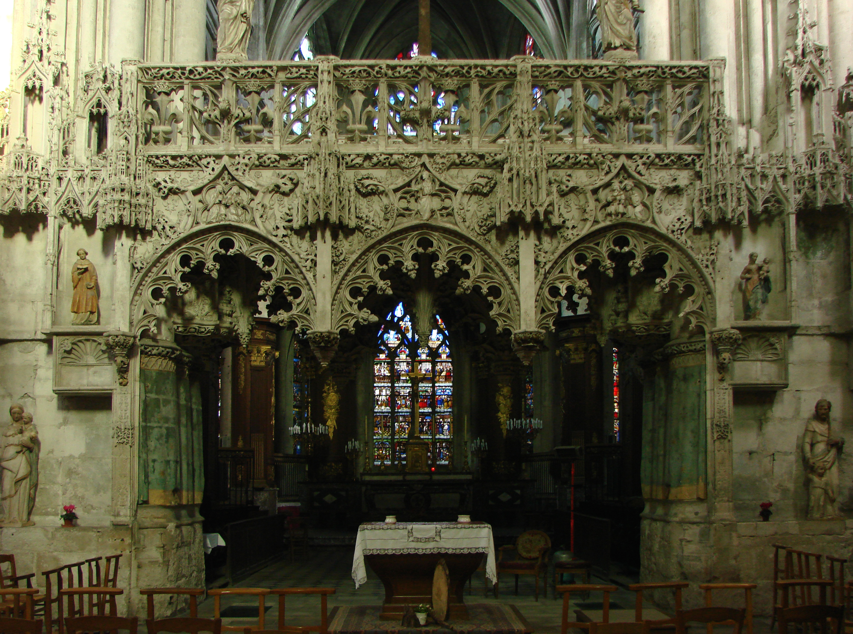 Jubé de l'église de la Madeleine à Troyes en Champagne.